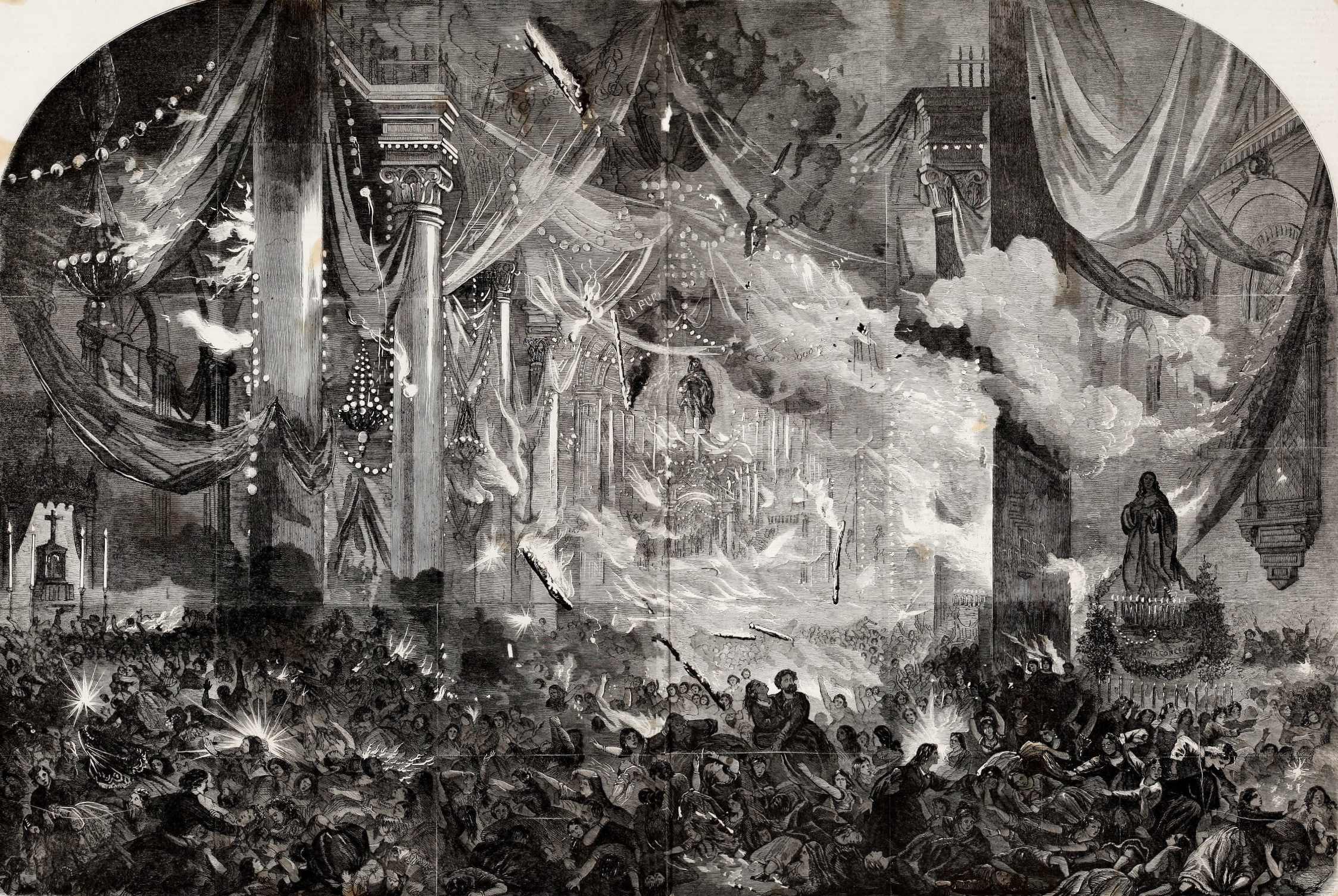 Interior de la Iglesia de la Compañia durante su incendio.